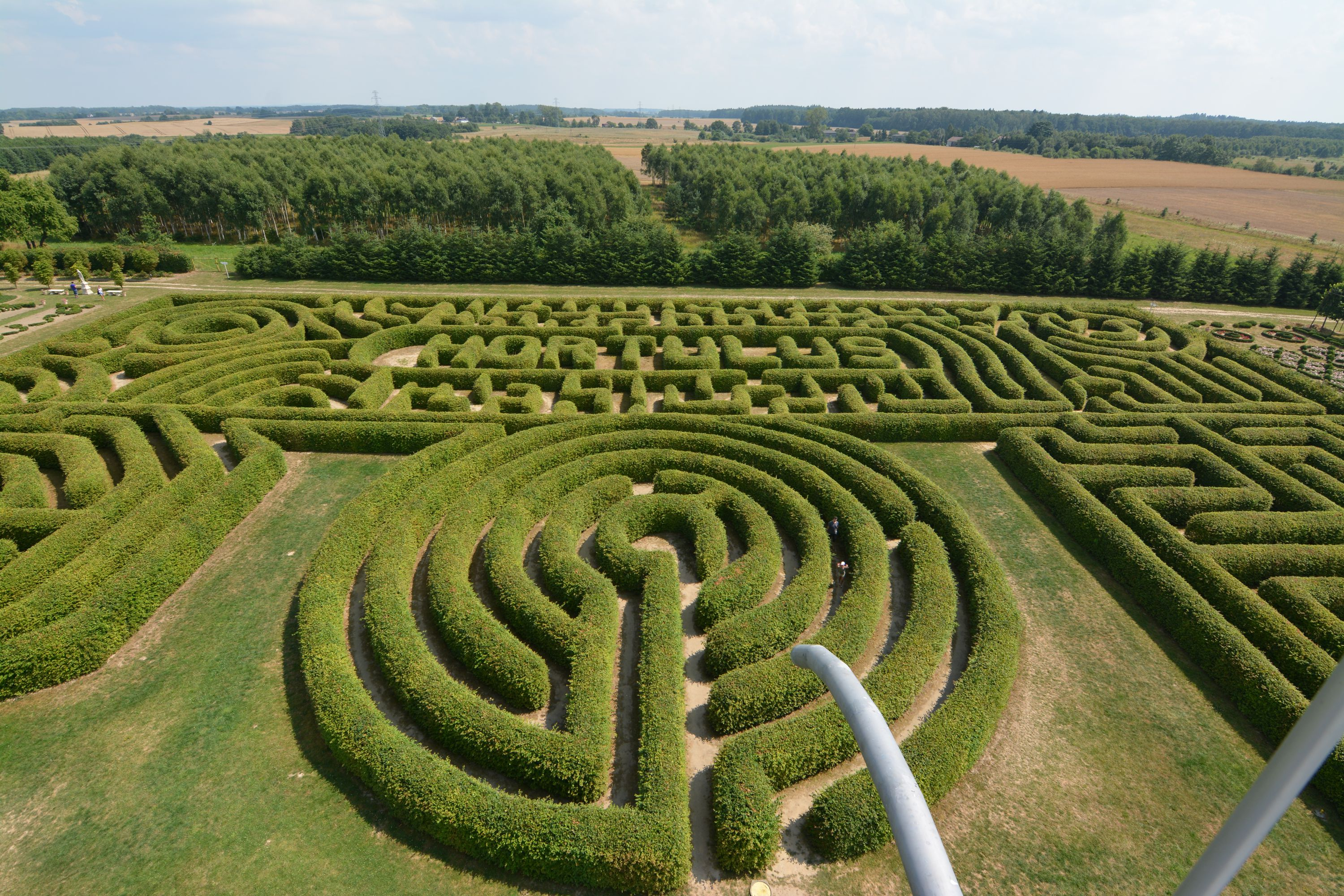 Ogrody Hortulus Spectabilis w Dobrzycy (powiat koszaliński)